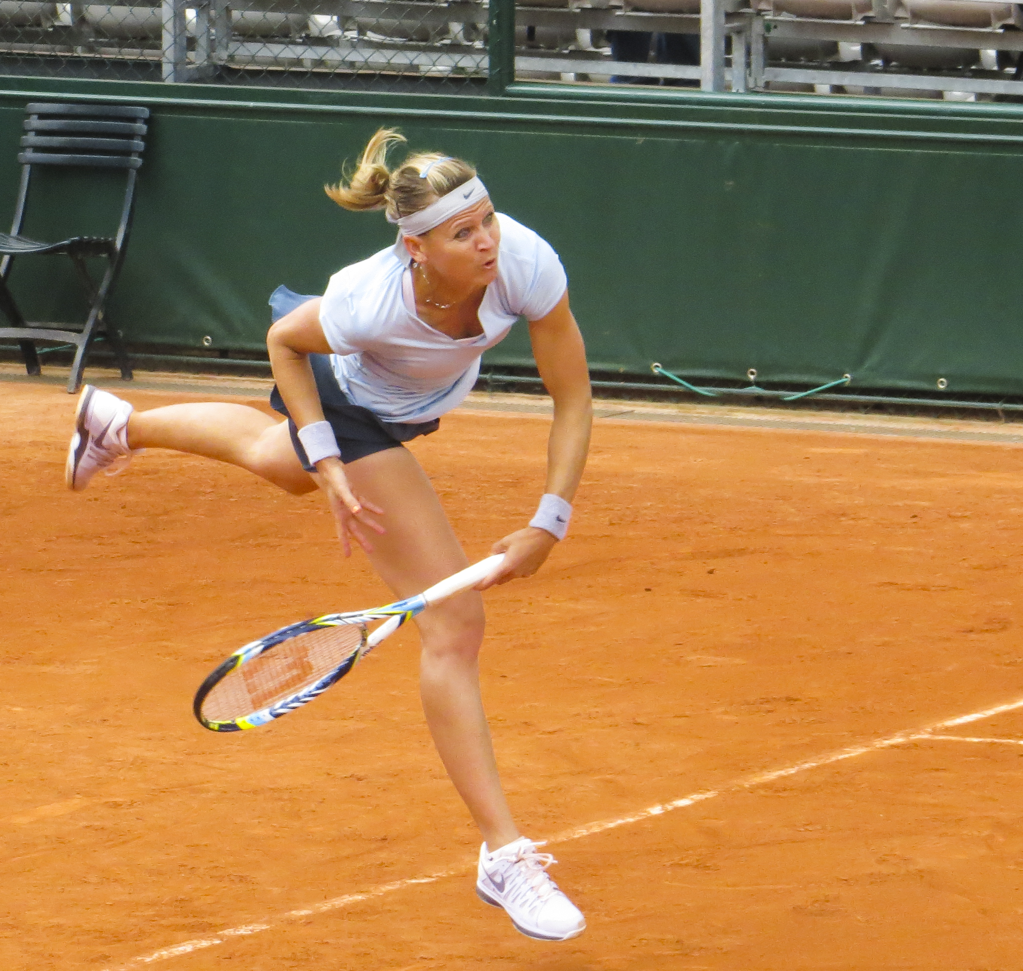 Lucie Šafářová